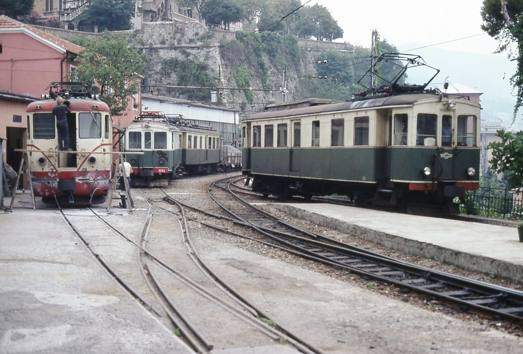 Treni in sosta alla stazione di Genova della ferrovia Genova-Casella. Da sinistra: elettromotrice serie 4-7 (in riparazione); locomotiva B51; elettromotrice A2